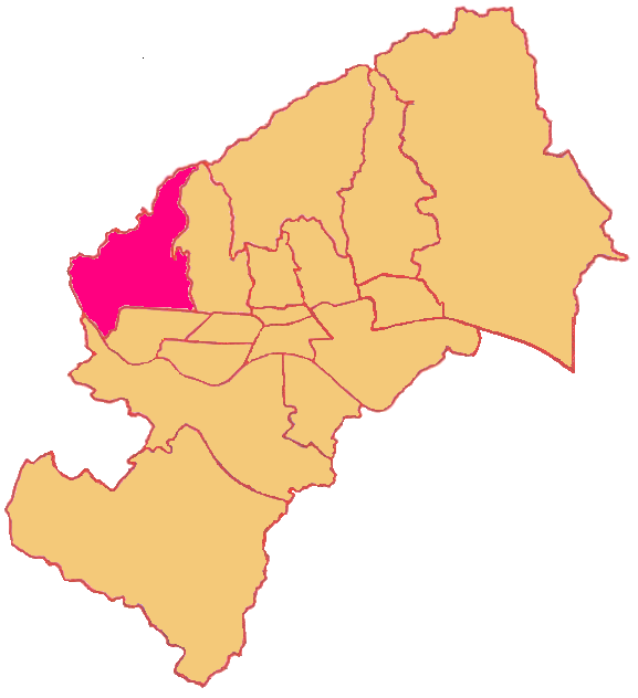 Map of Podsused Vrapče District in Zagreb (Gradska četvrt Podsused Vrapče)